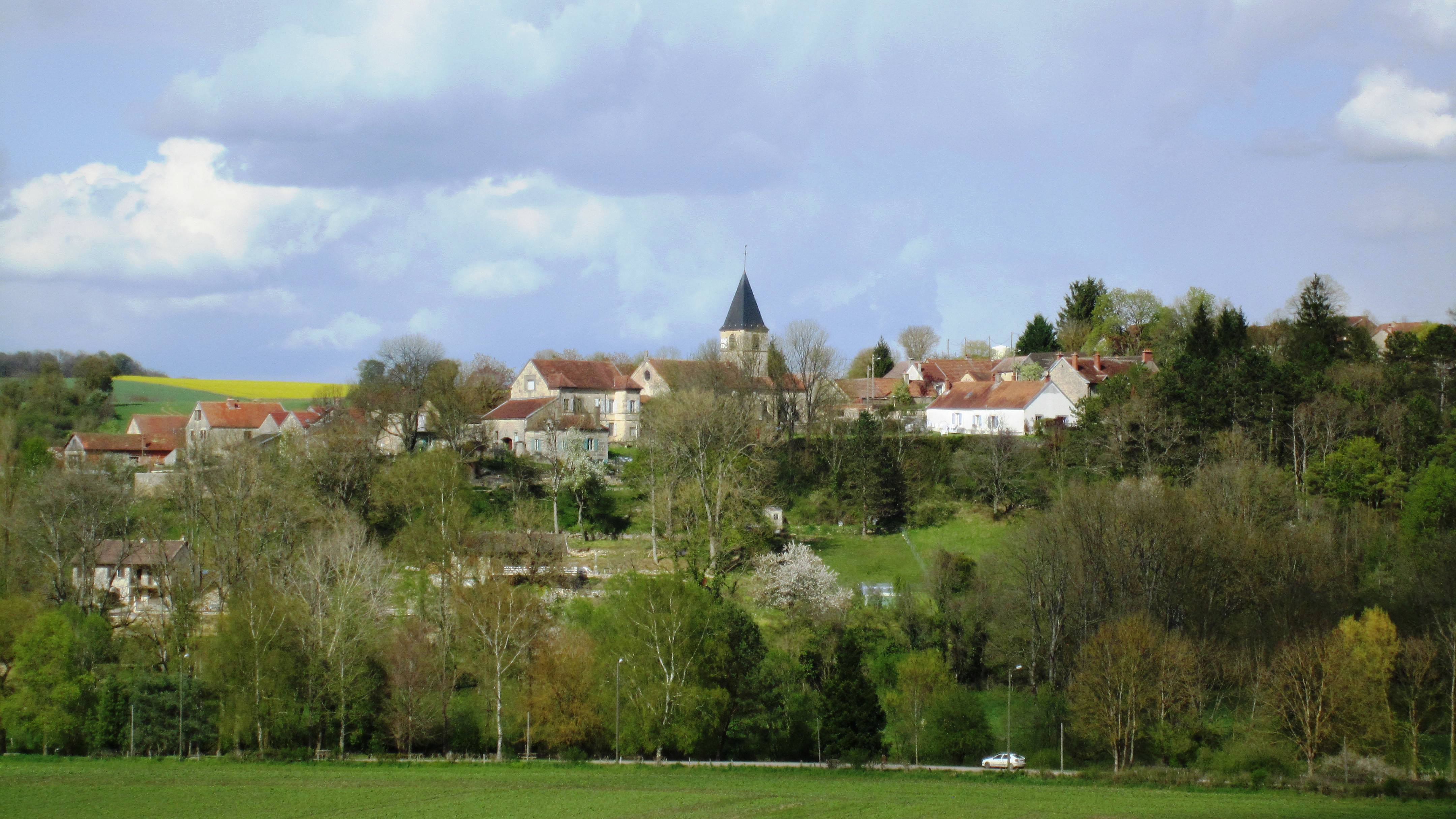 Nod-sur-Seine (Côte-d'Or)